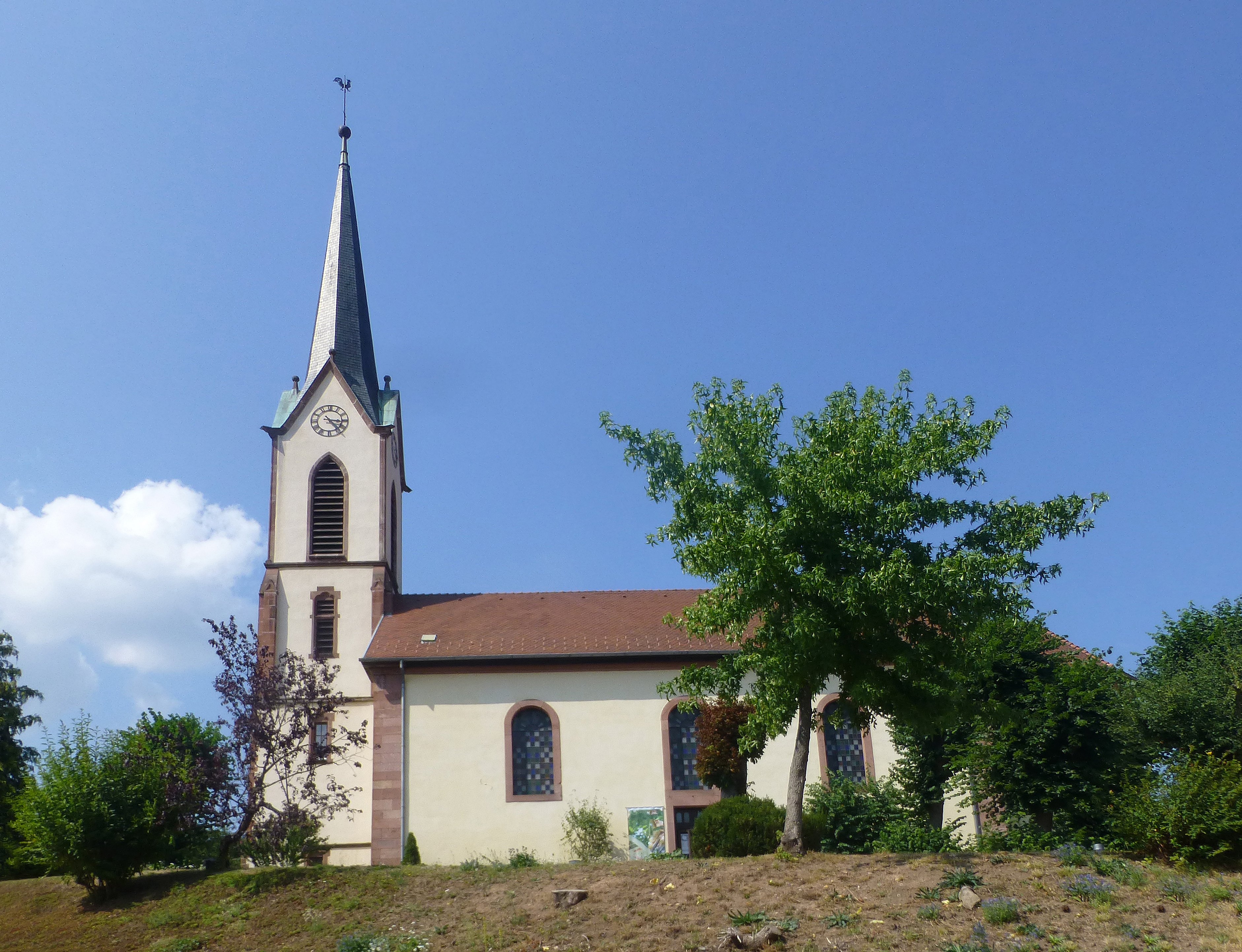 Eglise simultanée de Gunsbach (Haut-Rhin)